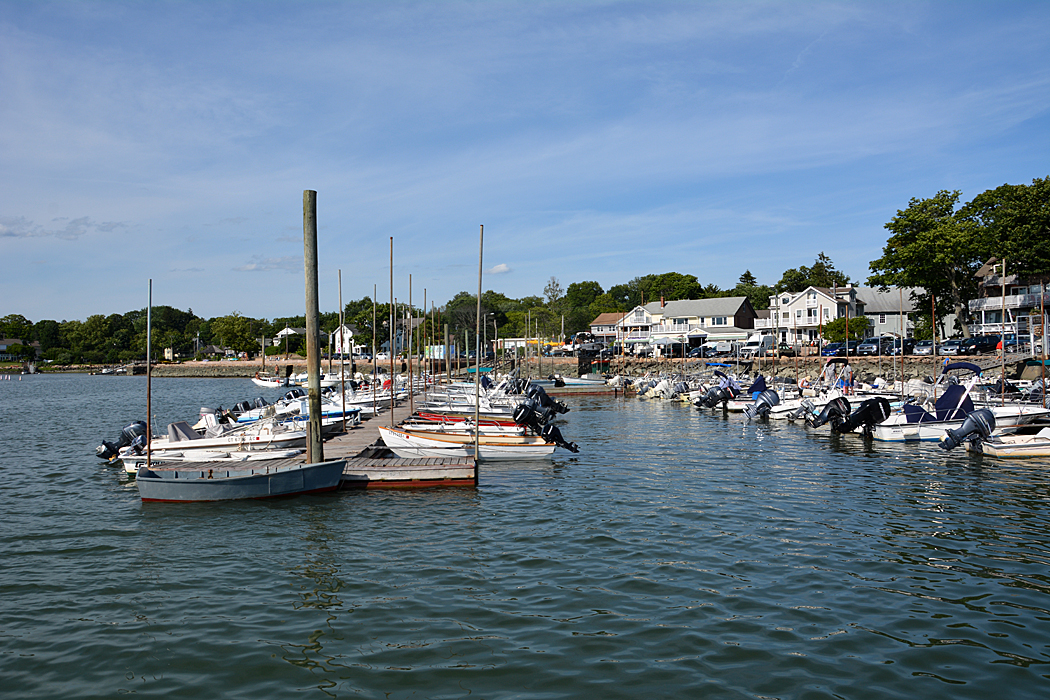 Das Fischerdorf Stony Creek bei Branford Connecticut